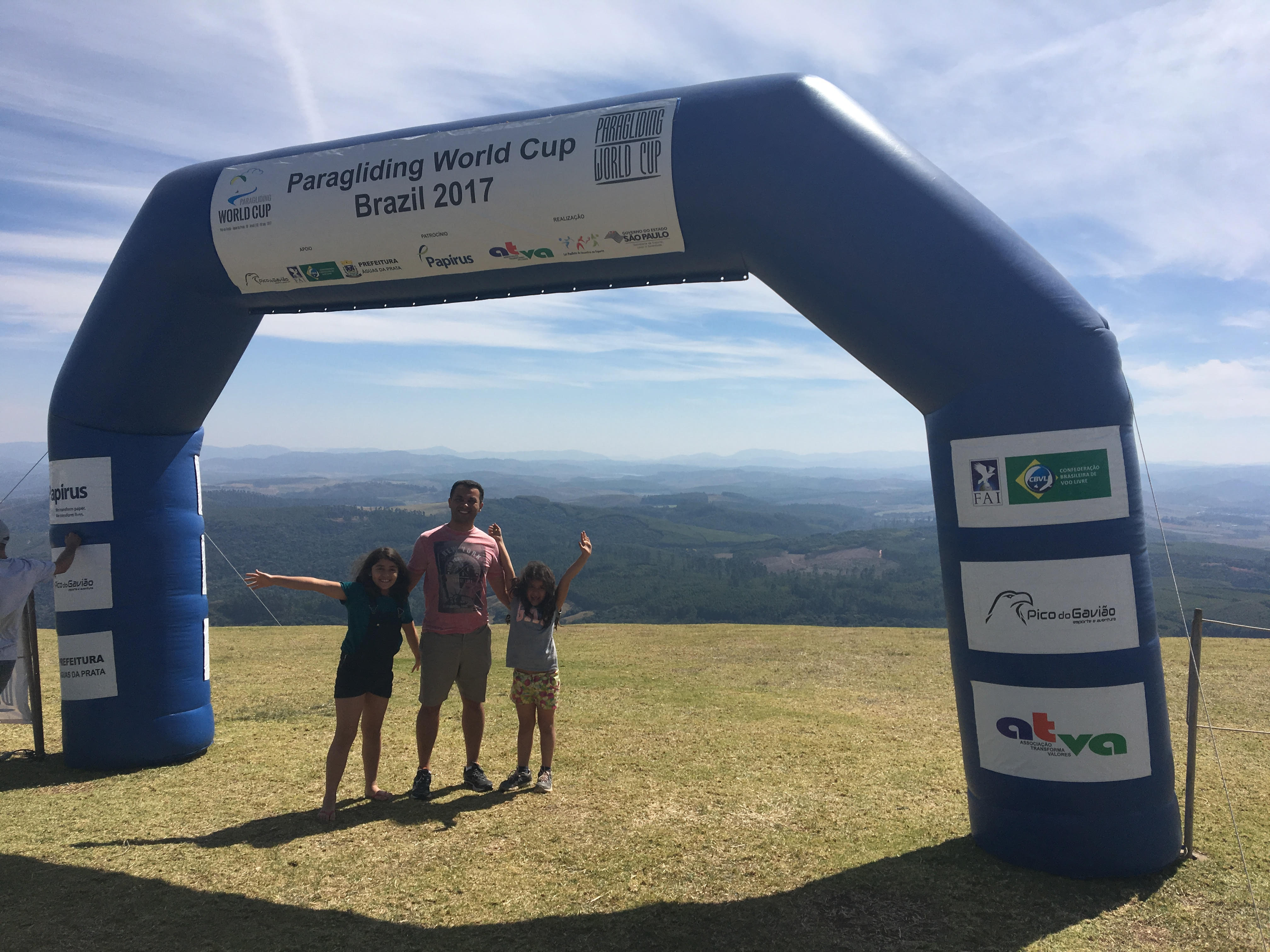 Minha família visitando o Pico do Gavião no dia do 4º Campeonato Mundial de Paraglider. Foi uma experiência inesquecível! De lá pode-se avistar lindas paisagens e as pequenas cidades do sul de Minas Gerais.